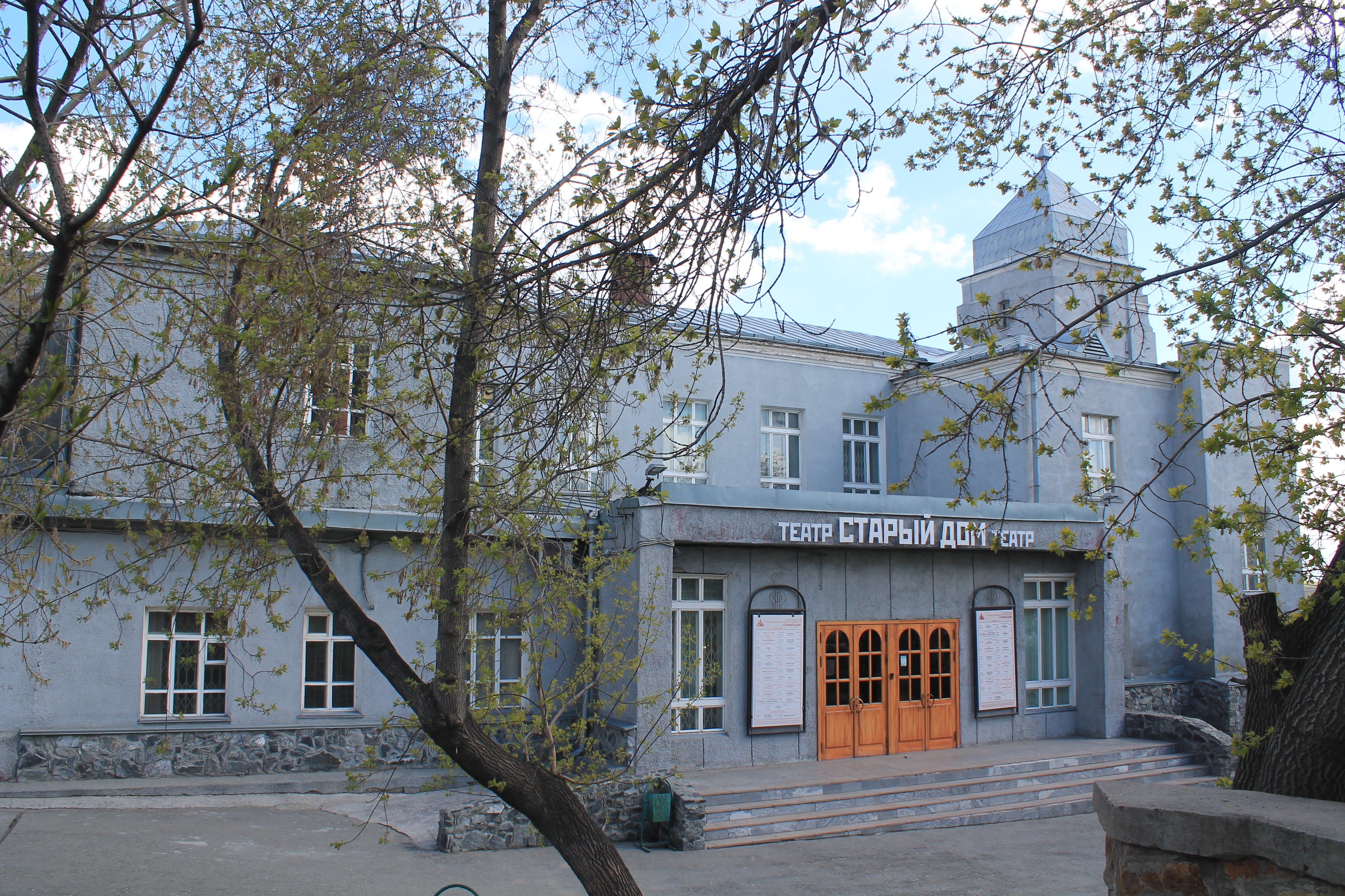 Театр "Старый дом", г. Новосибирск